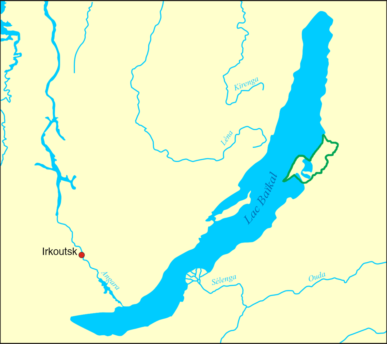 Limites Parc national Zabaïkalski